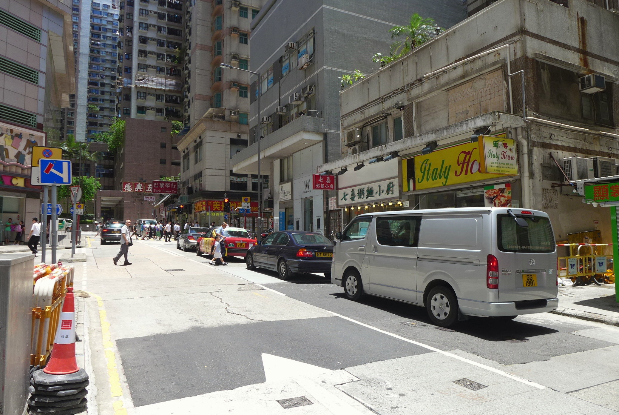 Kam Hong Street